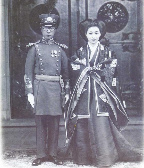 愛新覚羅溥傑と嵯峨浩